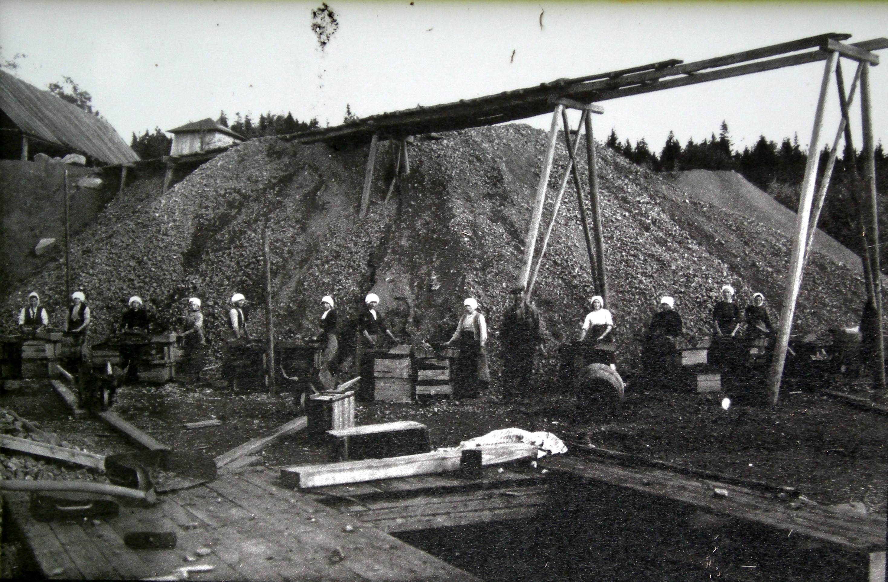 Vid en skräplats där man skilde malmen från gråberget. Tidigt 1900-tal.